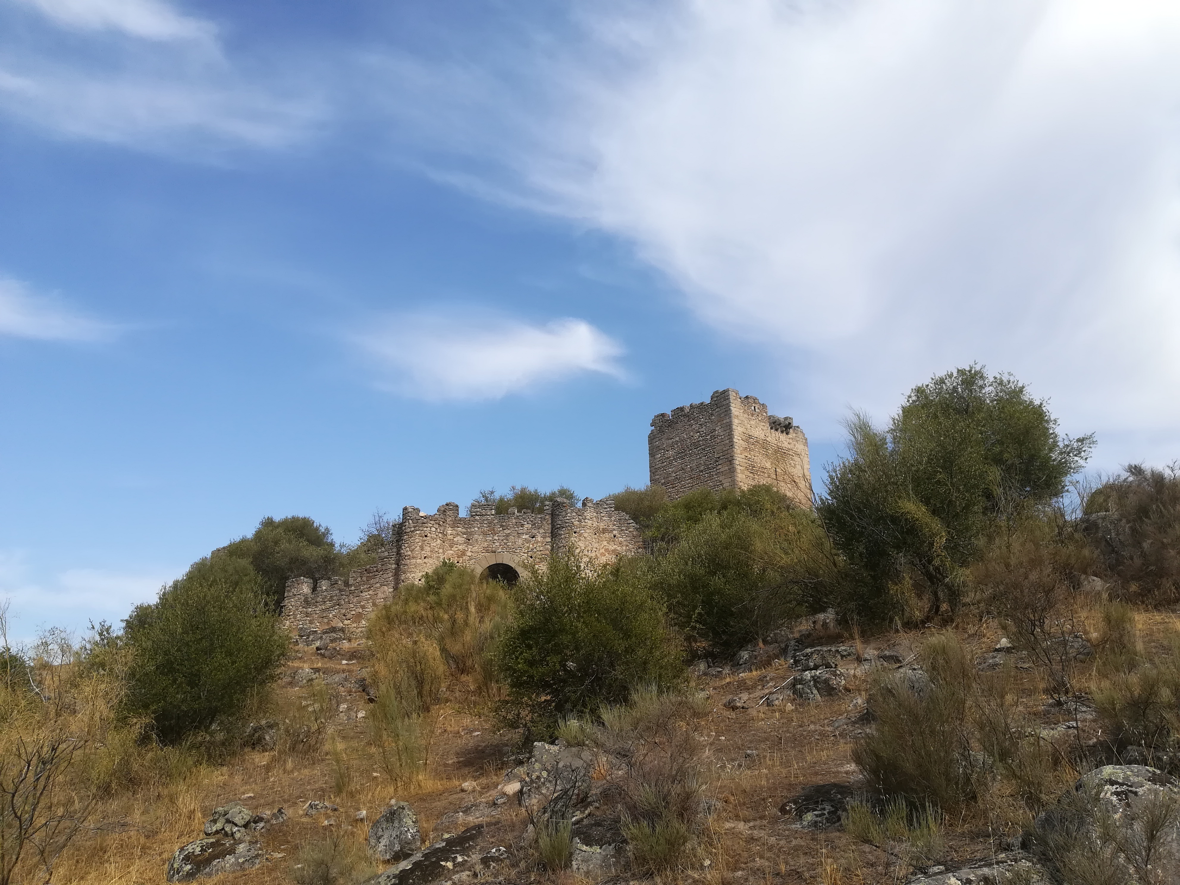 Ruinas del castillo de Peñafiel o de Racha Rachel en Zarza la Mayor, Cáceres.